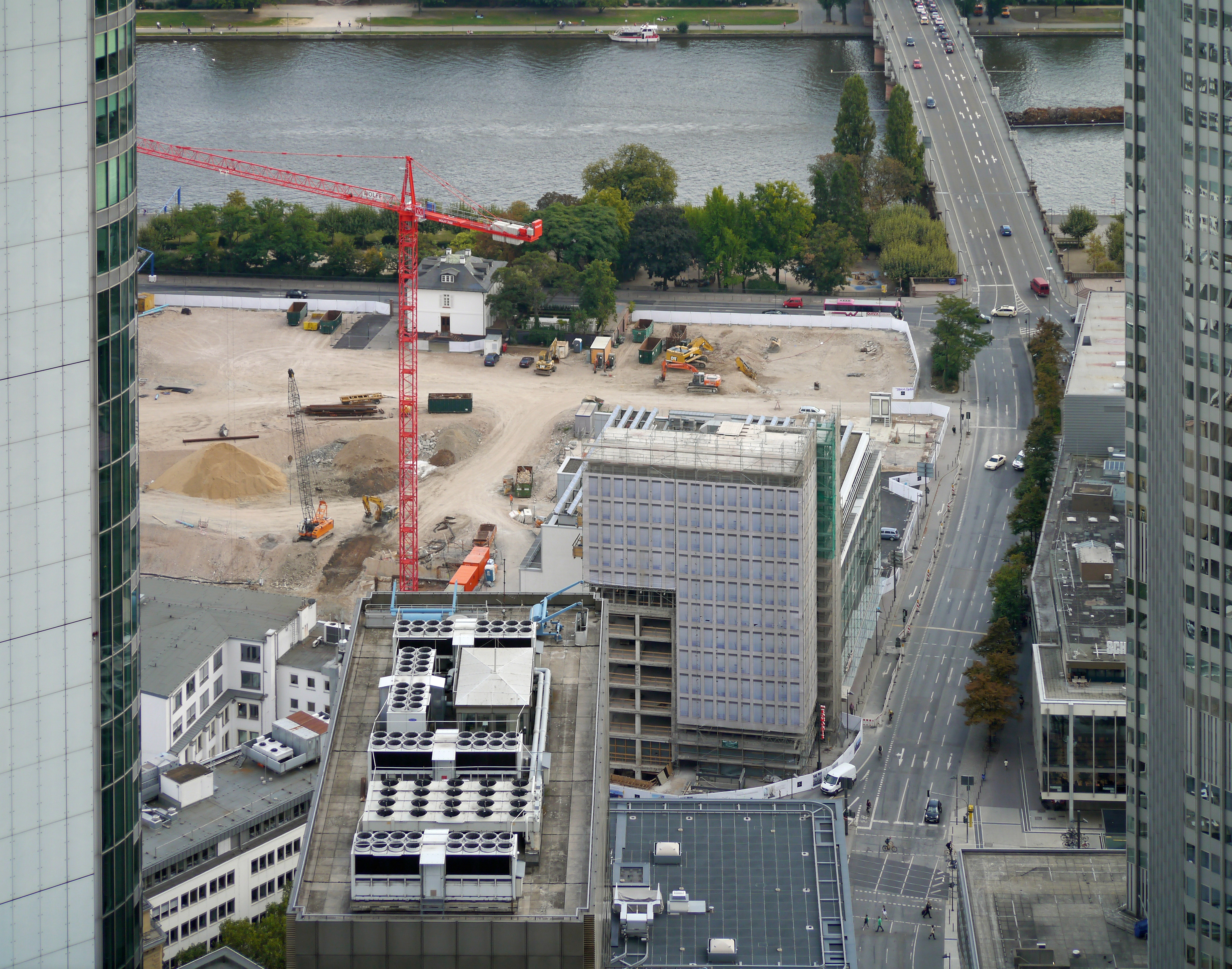 Main Tor-Baustelle, (2012) auf dem ehemaligen Degussa-Gelaende in Frankfurt am Main.